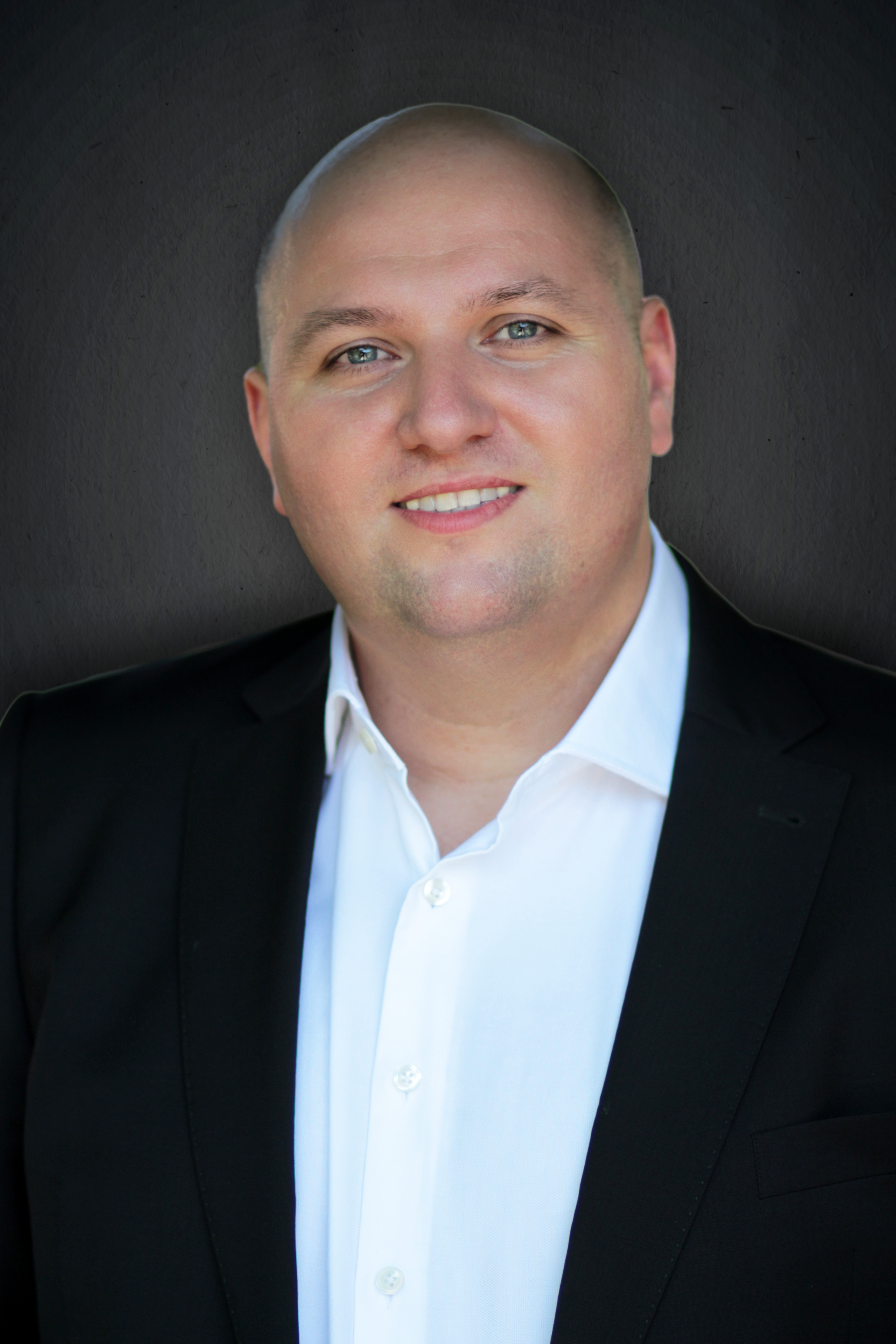 Bordás József dob-művész, Artisjus-díjas zenepedagógus, a Magyar Jazz Szövetség alelnöke